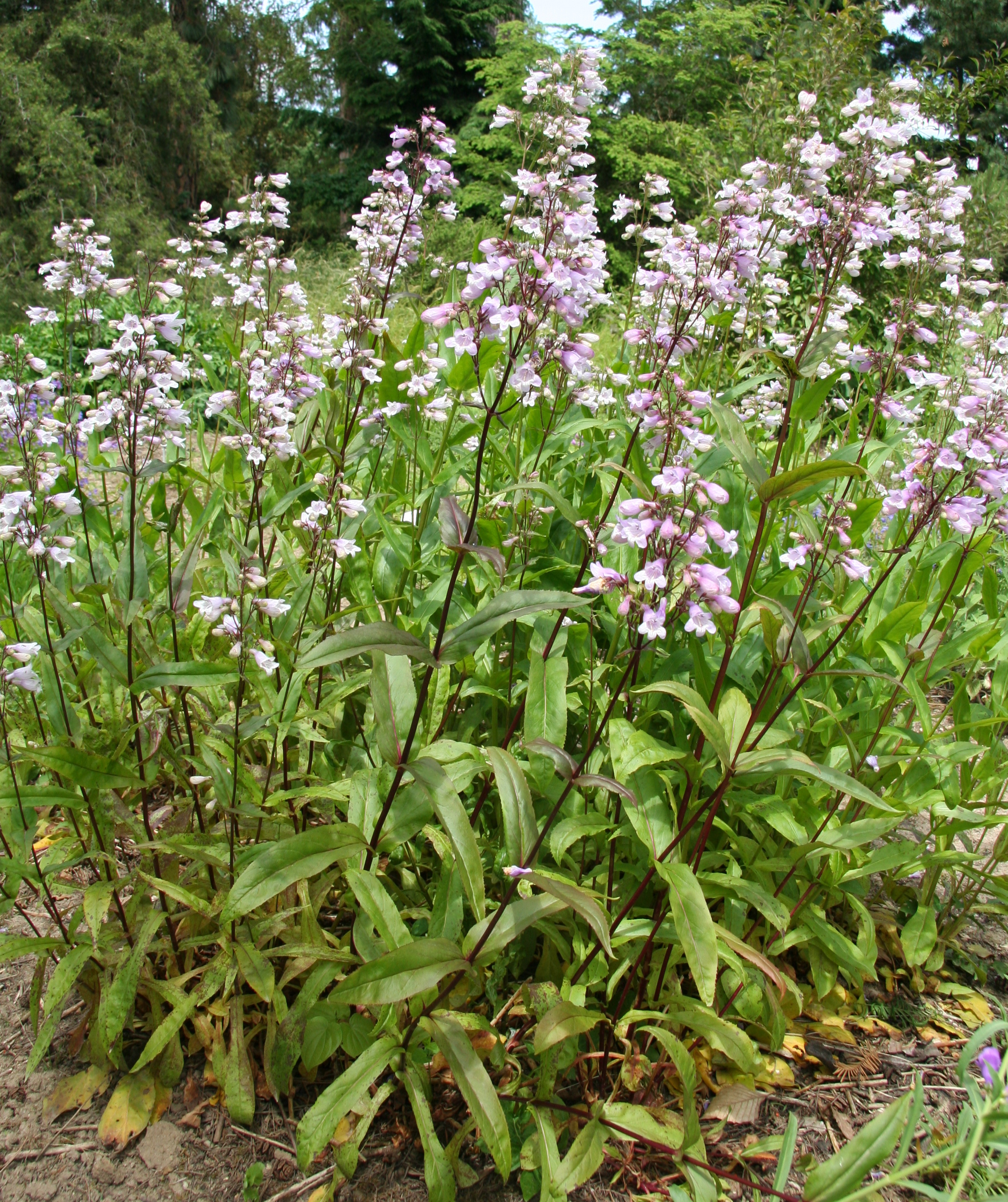 Penstemon laevigatus im Botanischen Garten Dresden